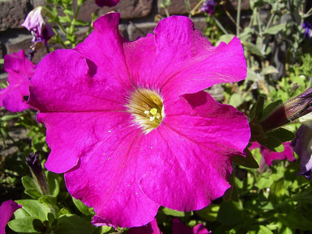 Den Haag Veenendaalkade, nl:4 september nl:2004